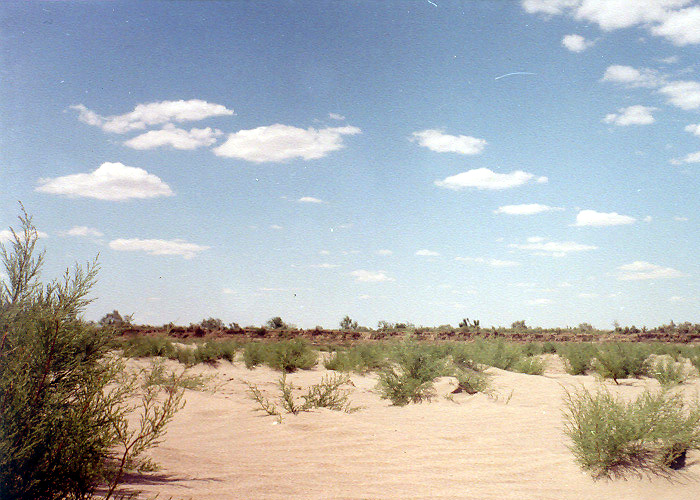 апрель май в степях Таукума,Каншенгел